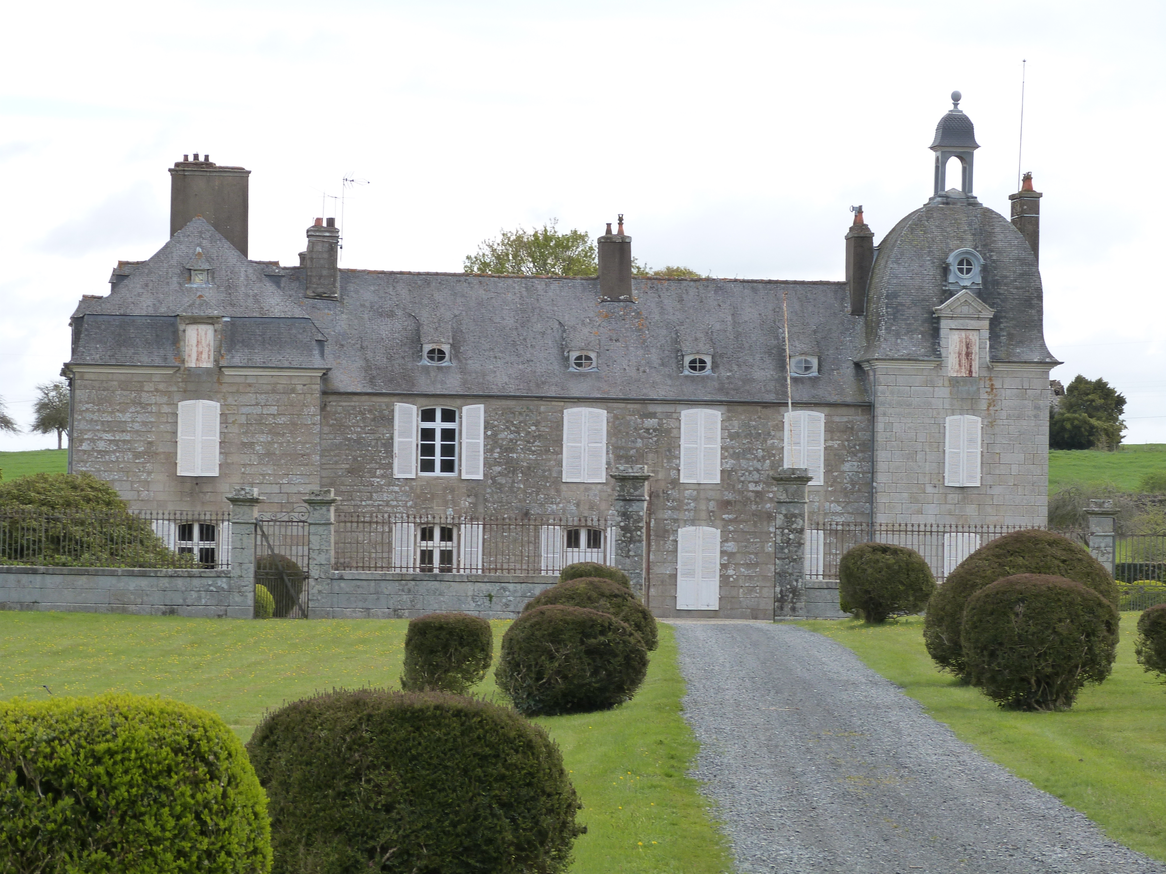 Corps principal du château de la Motte-Basse